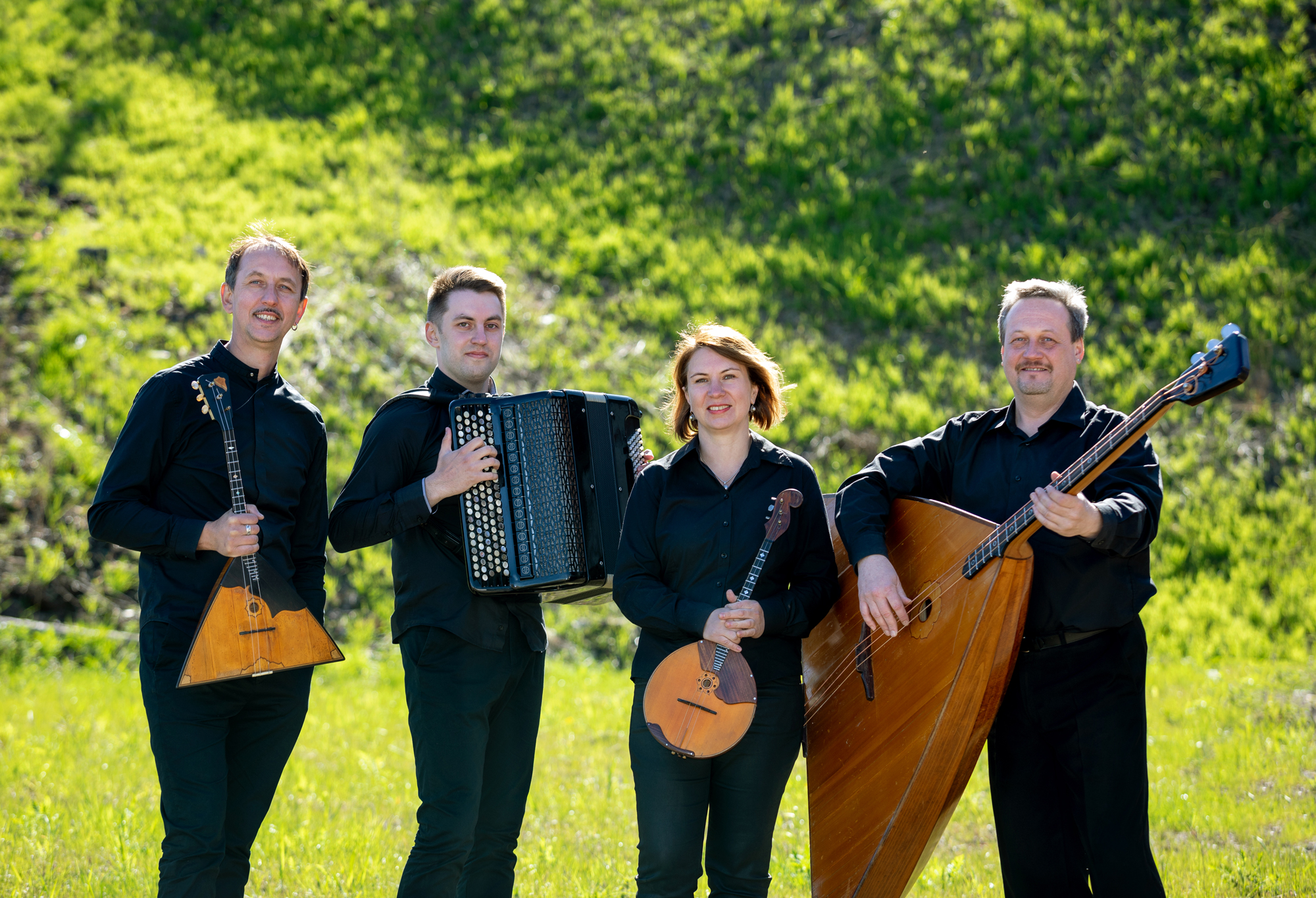 русский квартет EXPROMPT